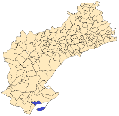 Situación de Sant Carles de la Ràpita en la provincia de Tarragona.